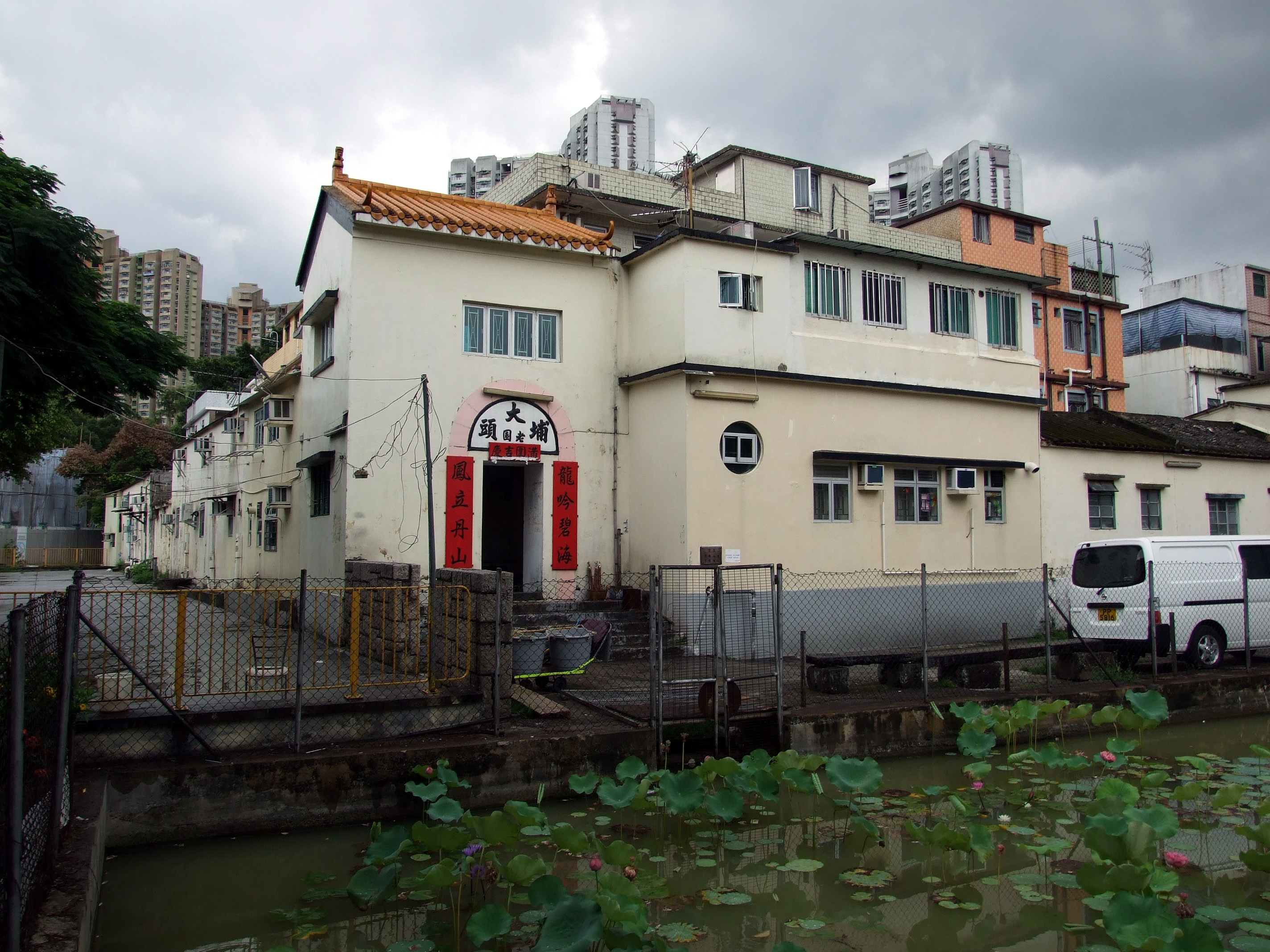 中文（香港）: 大埔頭水圍